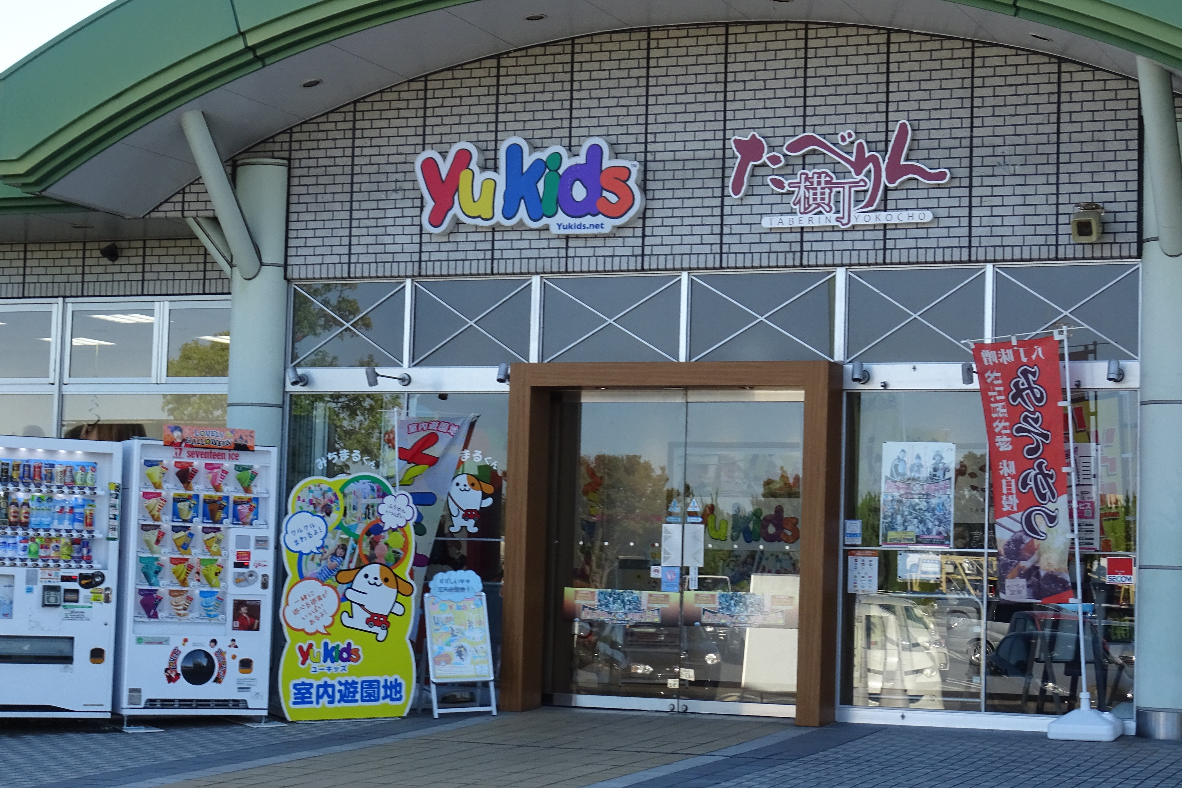 ゆうキッズ